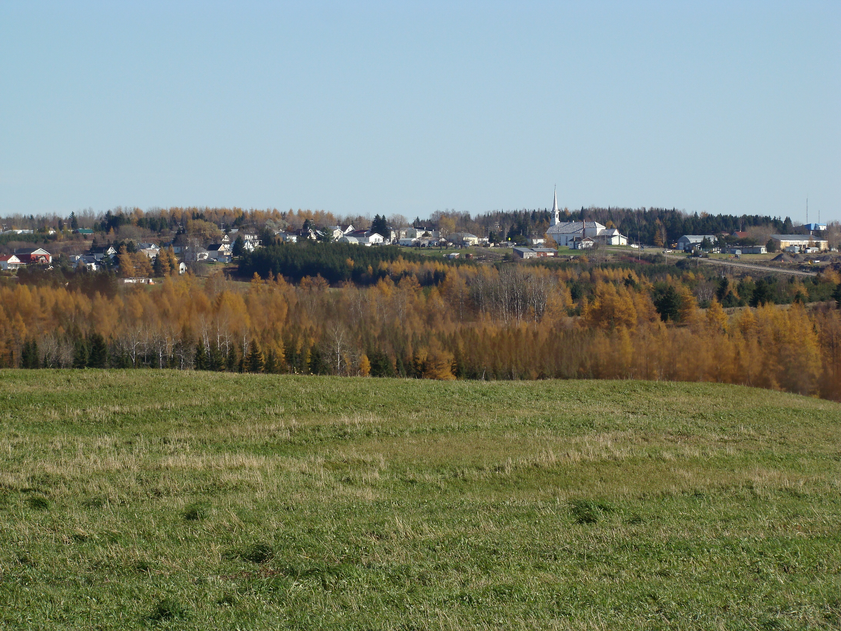 Vue sur le village de Saint-François-De-Sales.